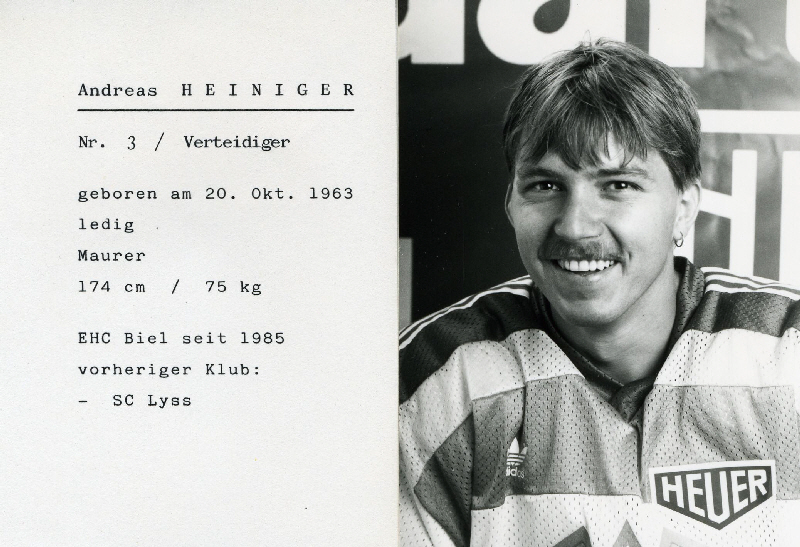 Spielerkarte EHC Biel 1985